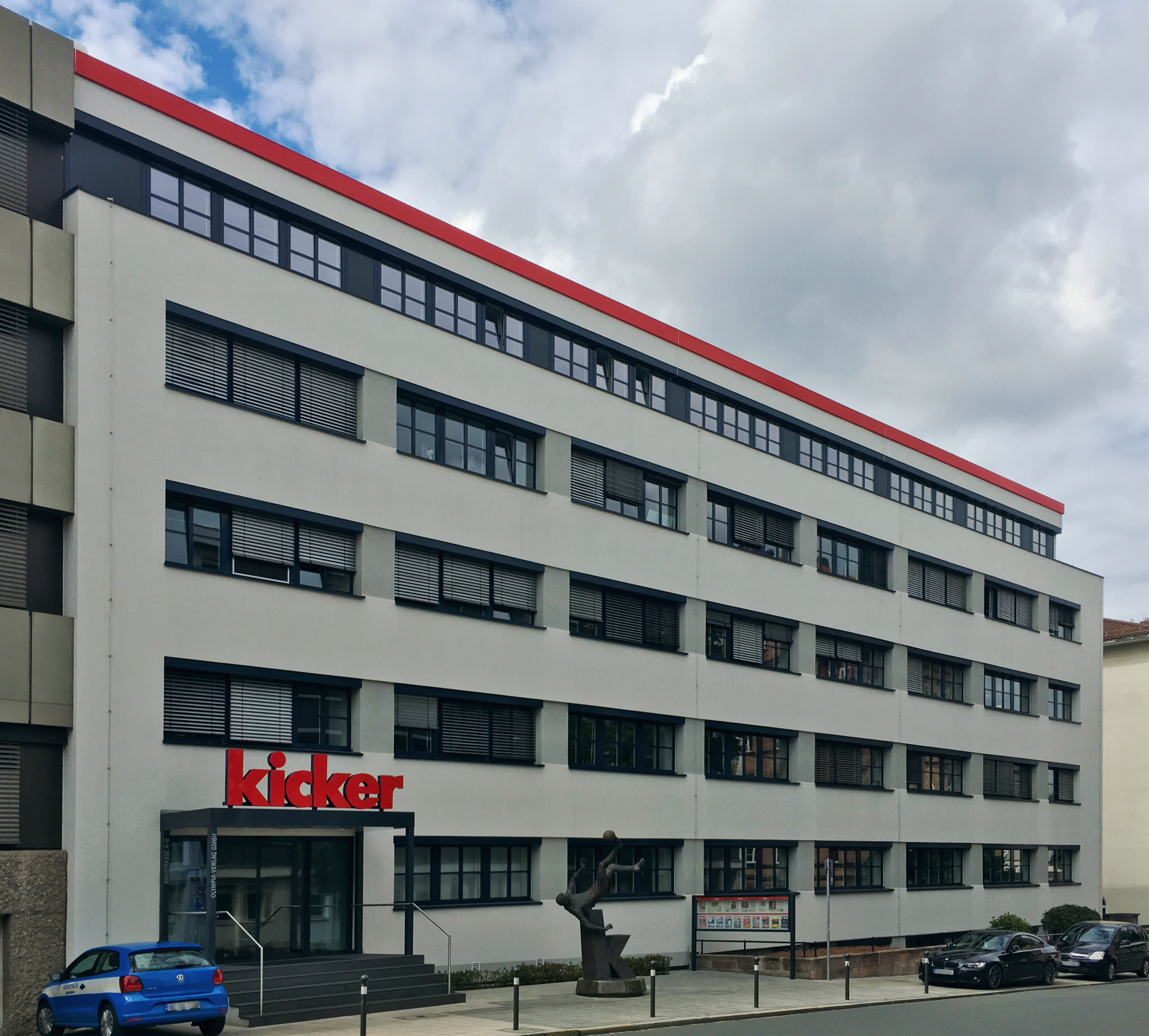 Kicker Verlagshaus in Nürnberg